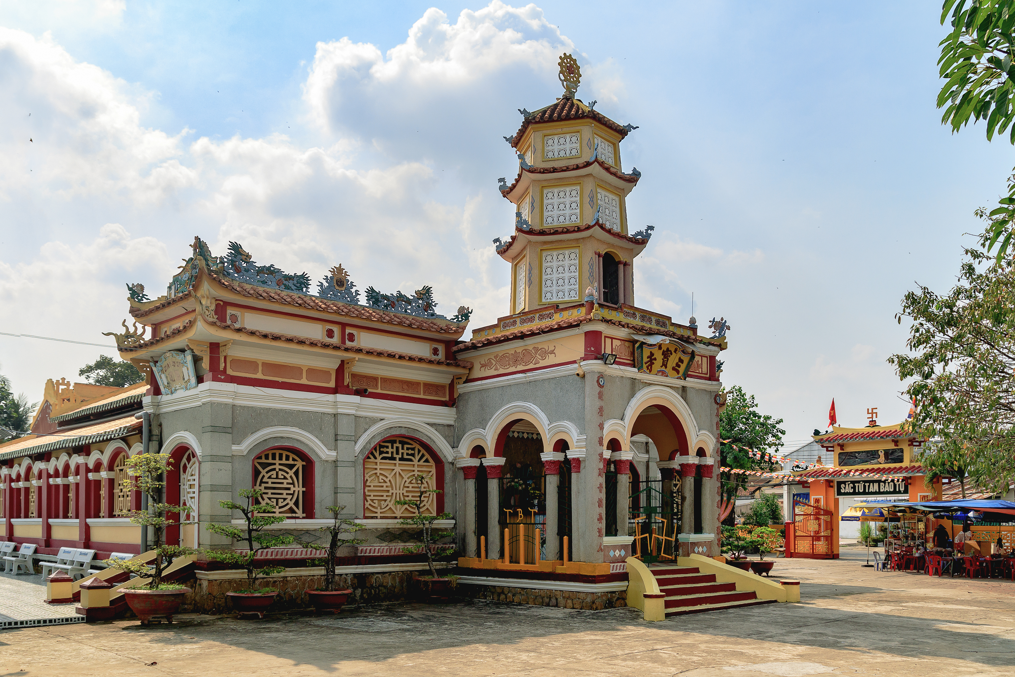 Chùa Sắc Tứ Tam Bảo là một chùa cổ tọa lạc ở số 3 đường Sư Thiện Ân, phường Vĩnh Lạc, TP Rạch Giá, tỉnh Kiên Giang, Việt Nam.